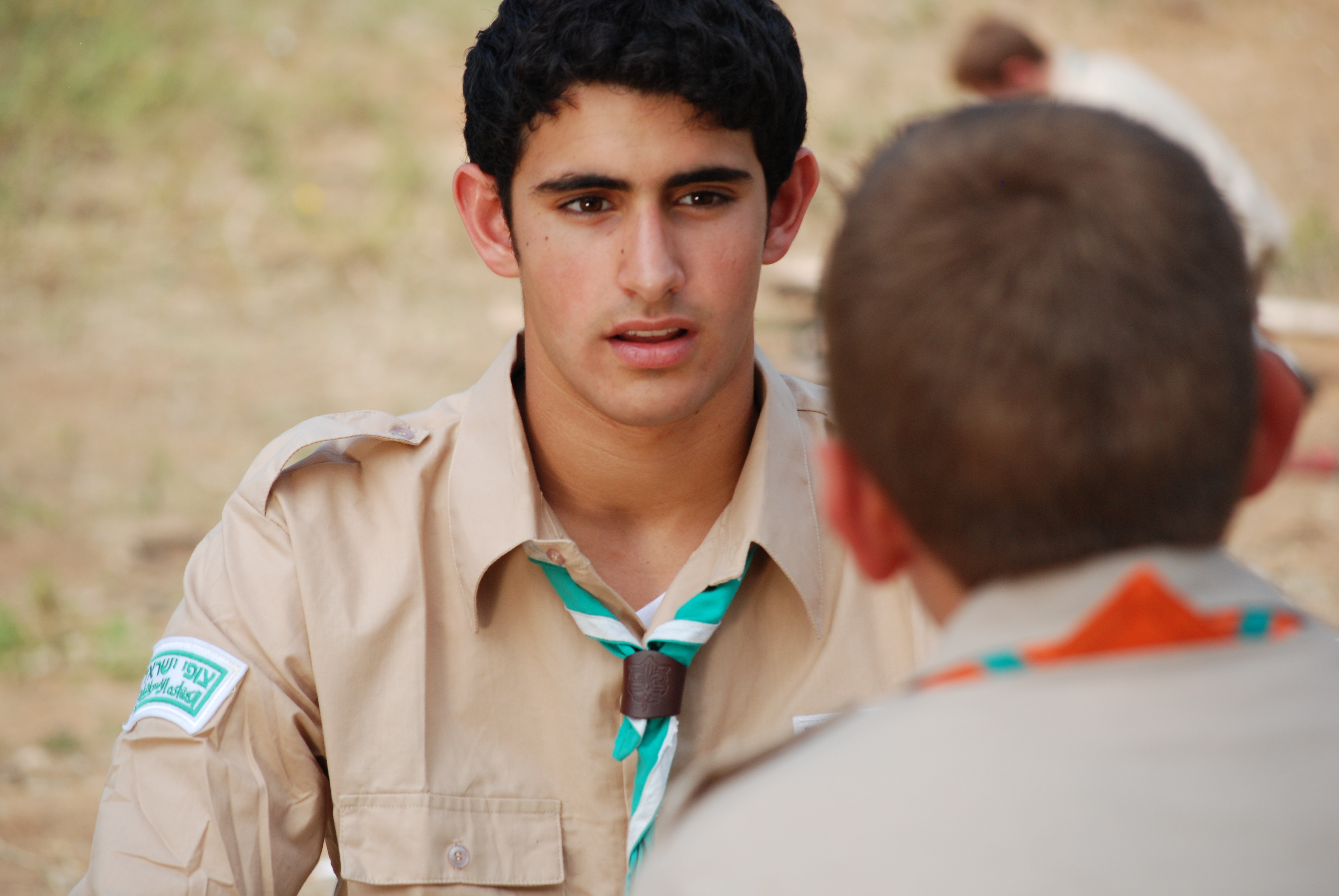 מדריך מדבר עם חניך בתנועת הצופים